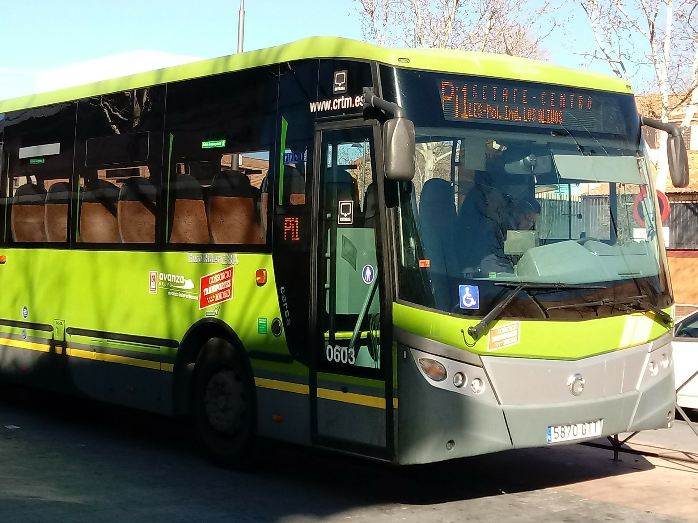 Autobús urbano de la línea Pi1 de Getafe, en la cabecera de Getafe Central